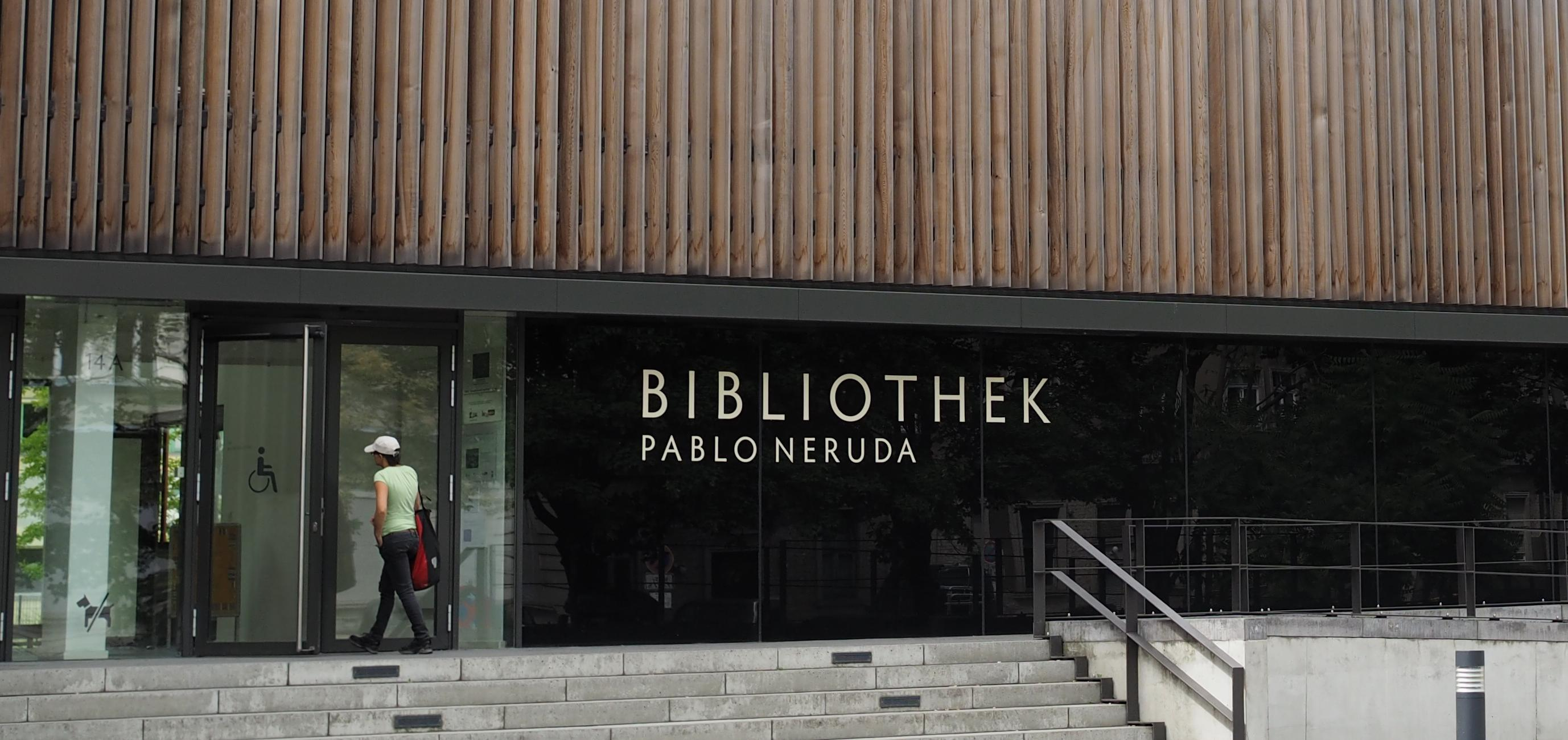 Eingangsbereich der Pablo Neruda Bibliothek